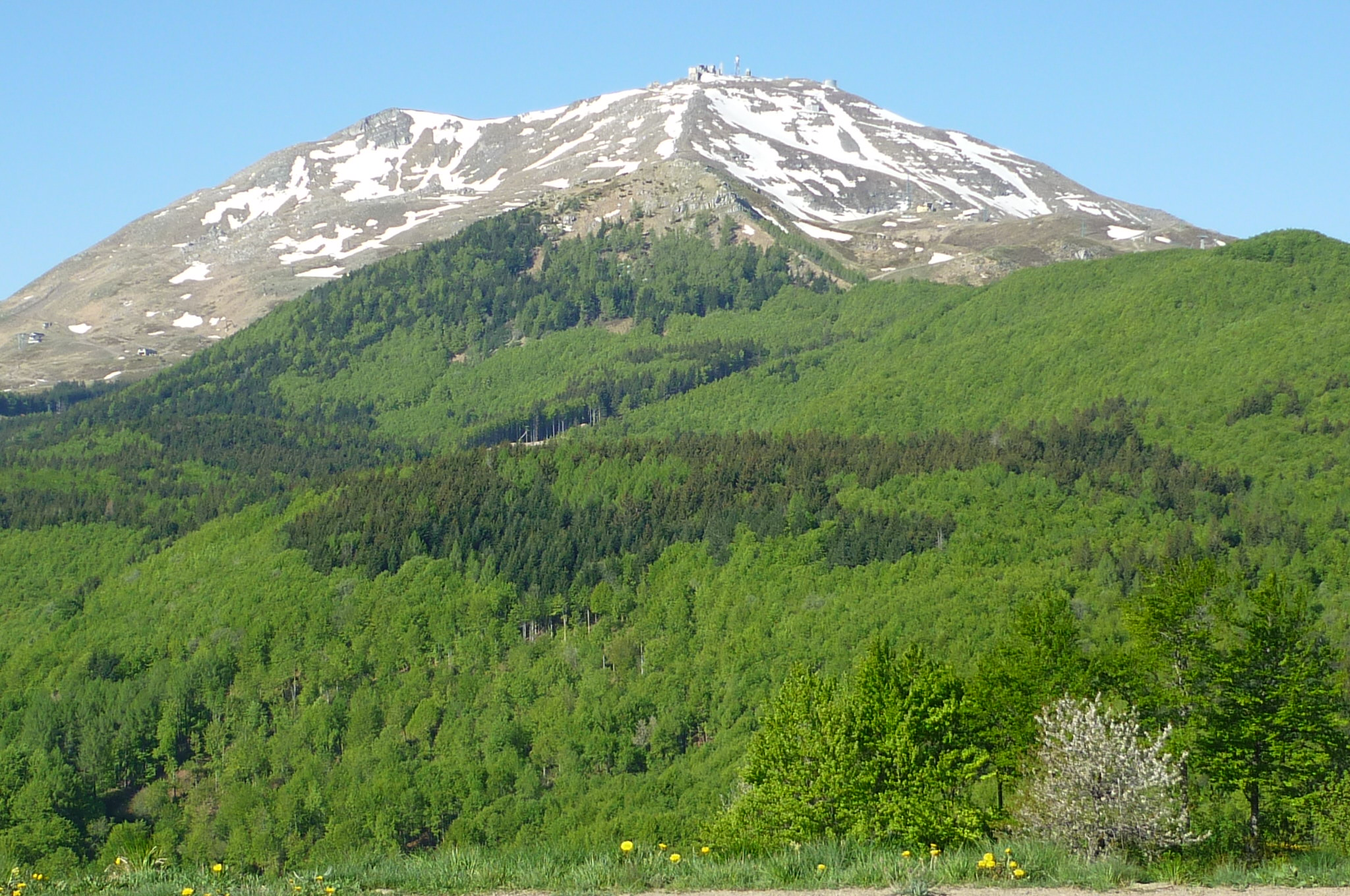 Blick auf den Monte Cimone